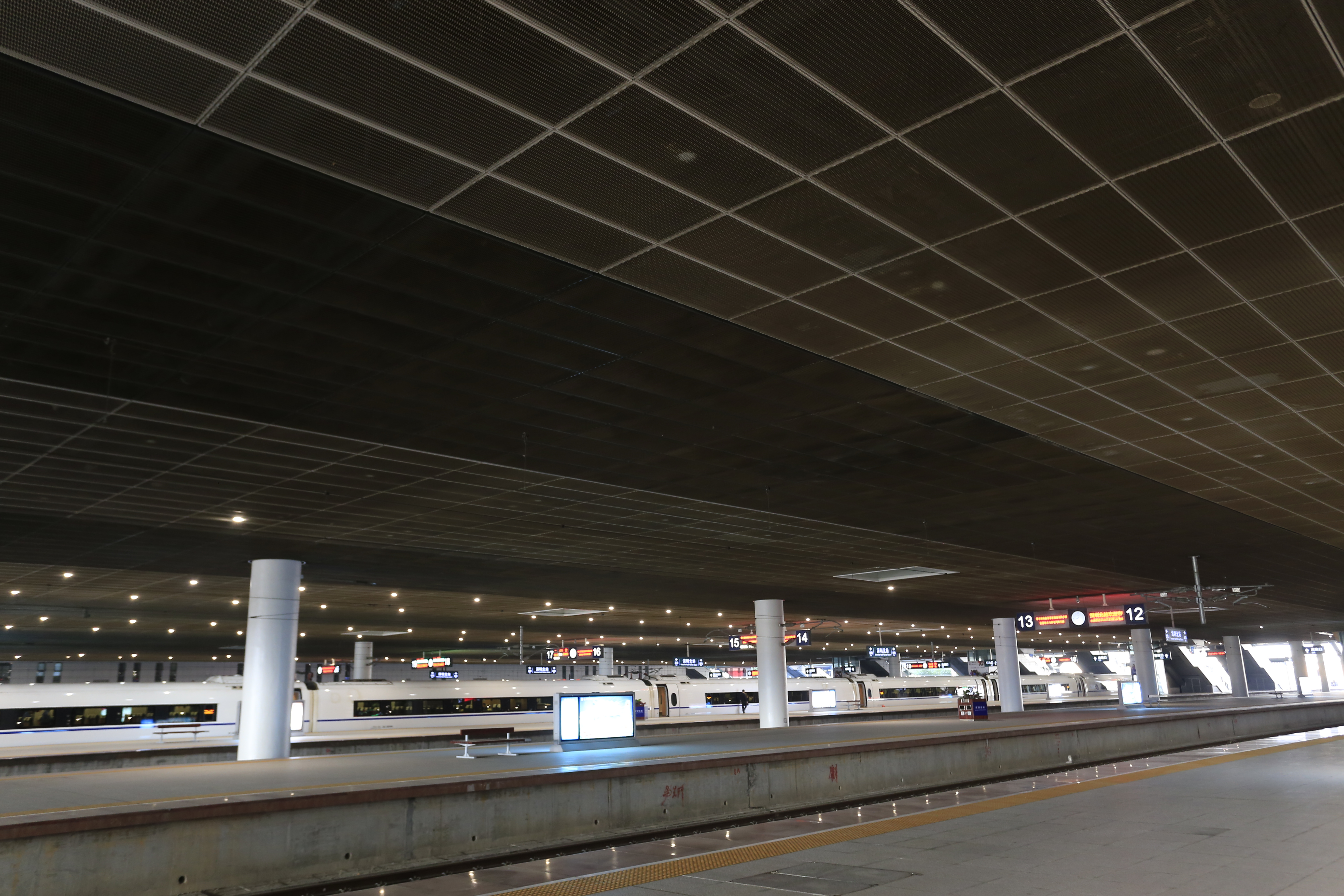 深圳北站